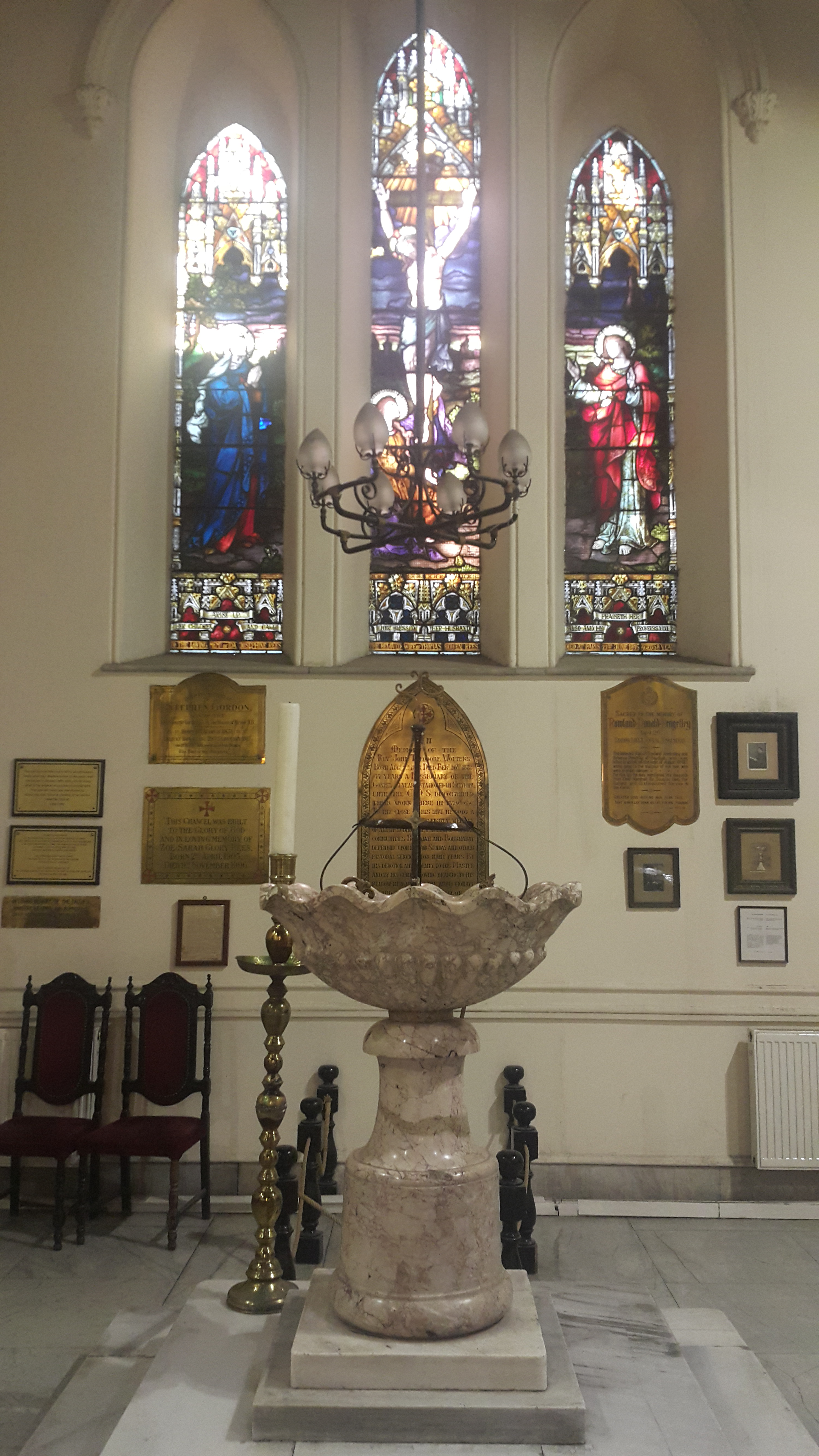 St. John Evangelist Church interior windows